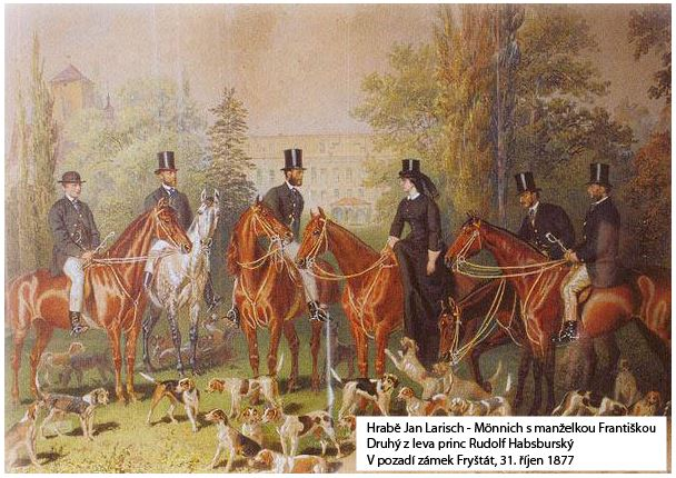 Hrabě Jan Larisch - Mönnich s manželkou Františkou 31. října 1877 na honu na svém sídle na zámku Fryštát. Druhý zleva korunní princ Rudolf Habsburský.